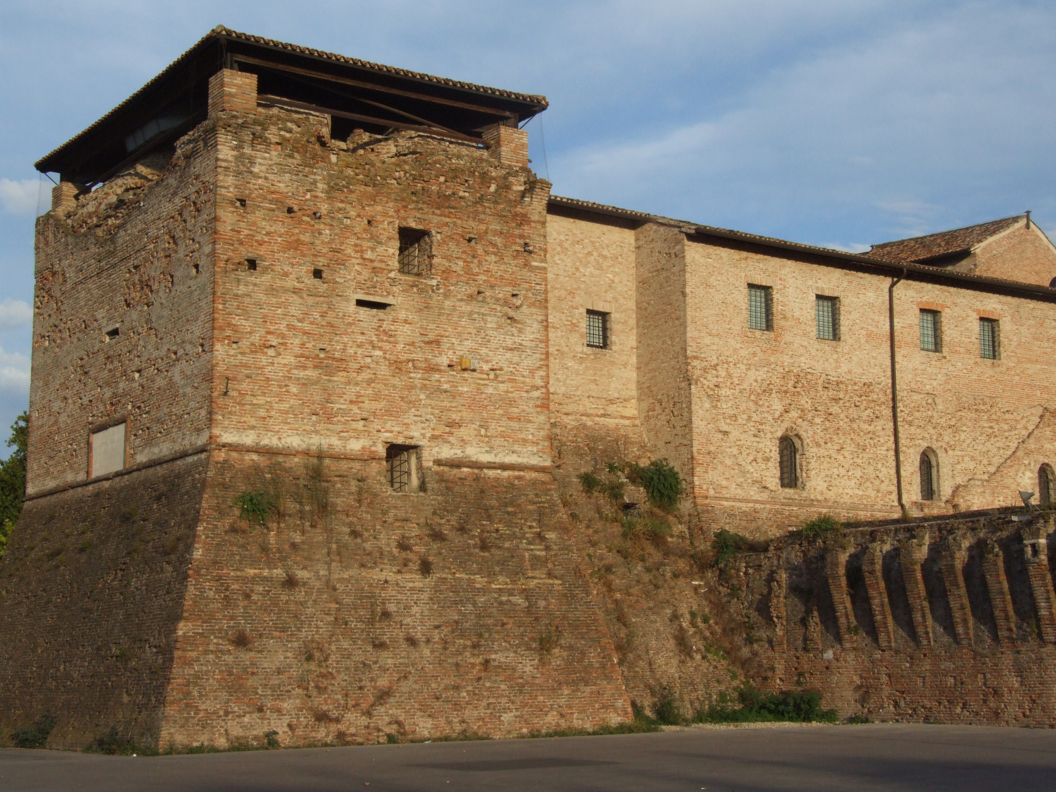 Castel Sismondo This is a photo of a monument which is part of cultural heritage of Italy.